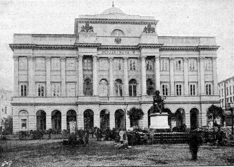 Ilustracja Encyklopedii staropolskiej T.4 385 - Gmach Towarzystwa Przyjaciół Nauk w Warszawie